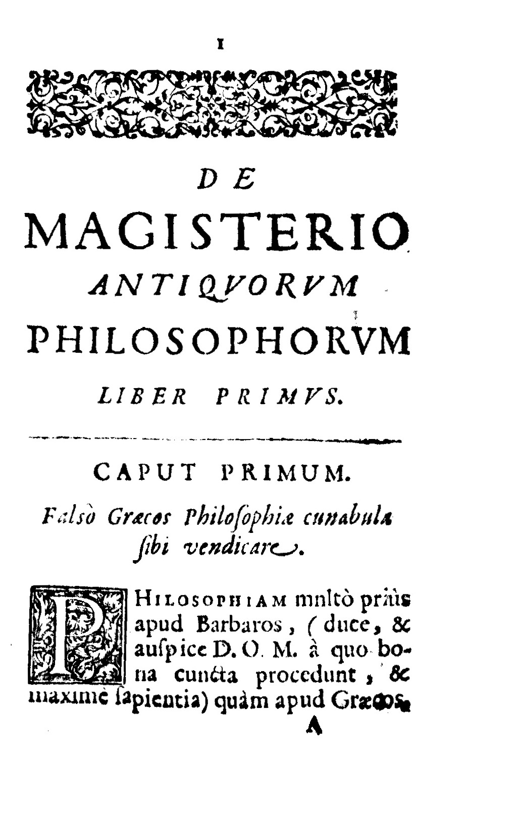 Leonardi Cozzandi Brixiani De magisterio antiquorum philosophorum libri 6. illustrissimo ac ornatissimo Hippolito Fenarolo dicati. - Geneuae : apud Samuelem de Tournes, 1684. - [32], 421, [147] p. ; 12º .